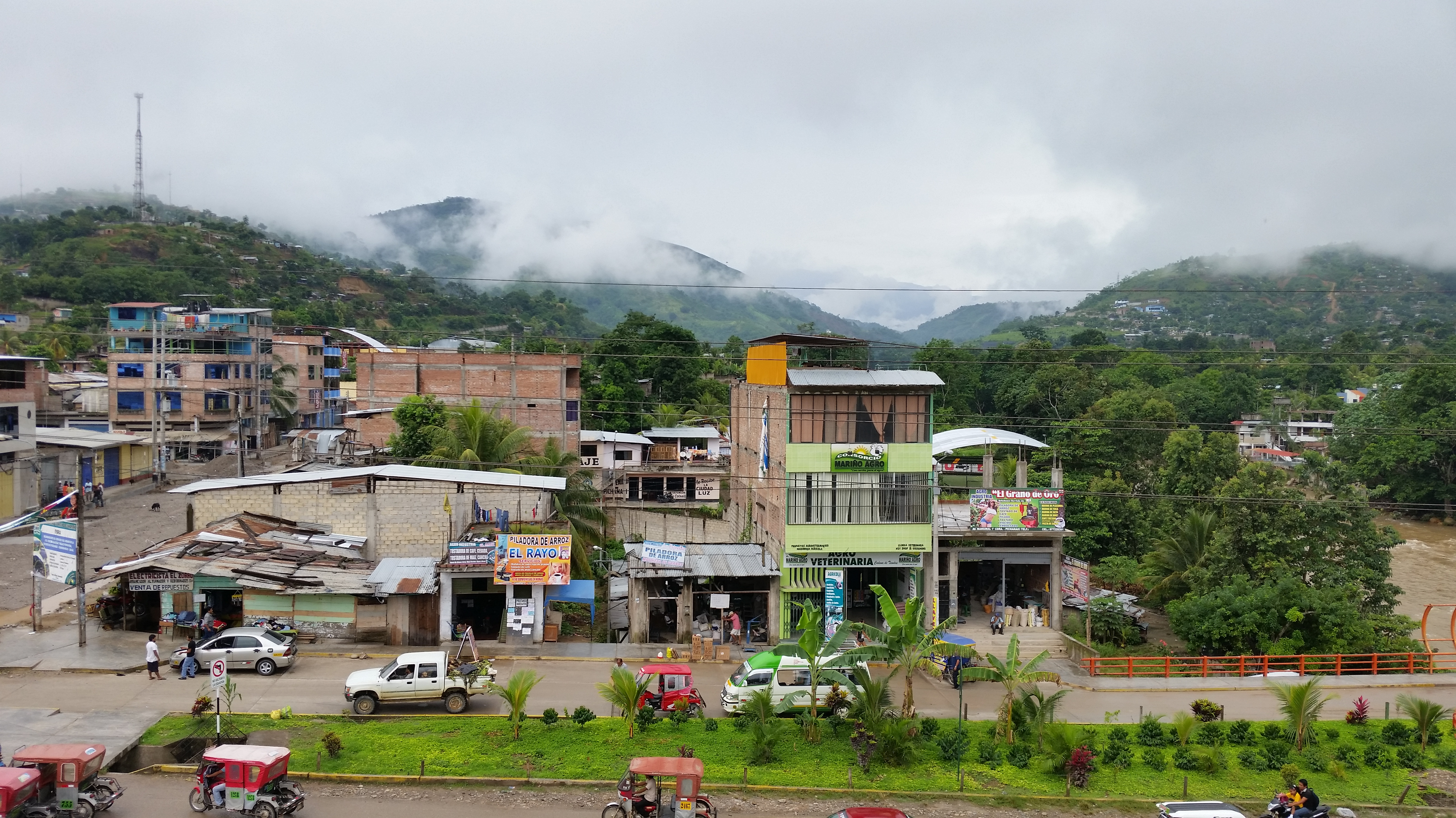 Pichanaqui